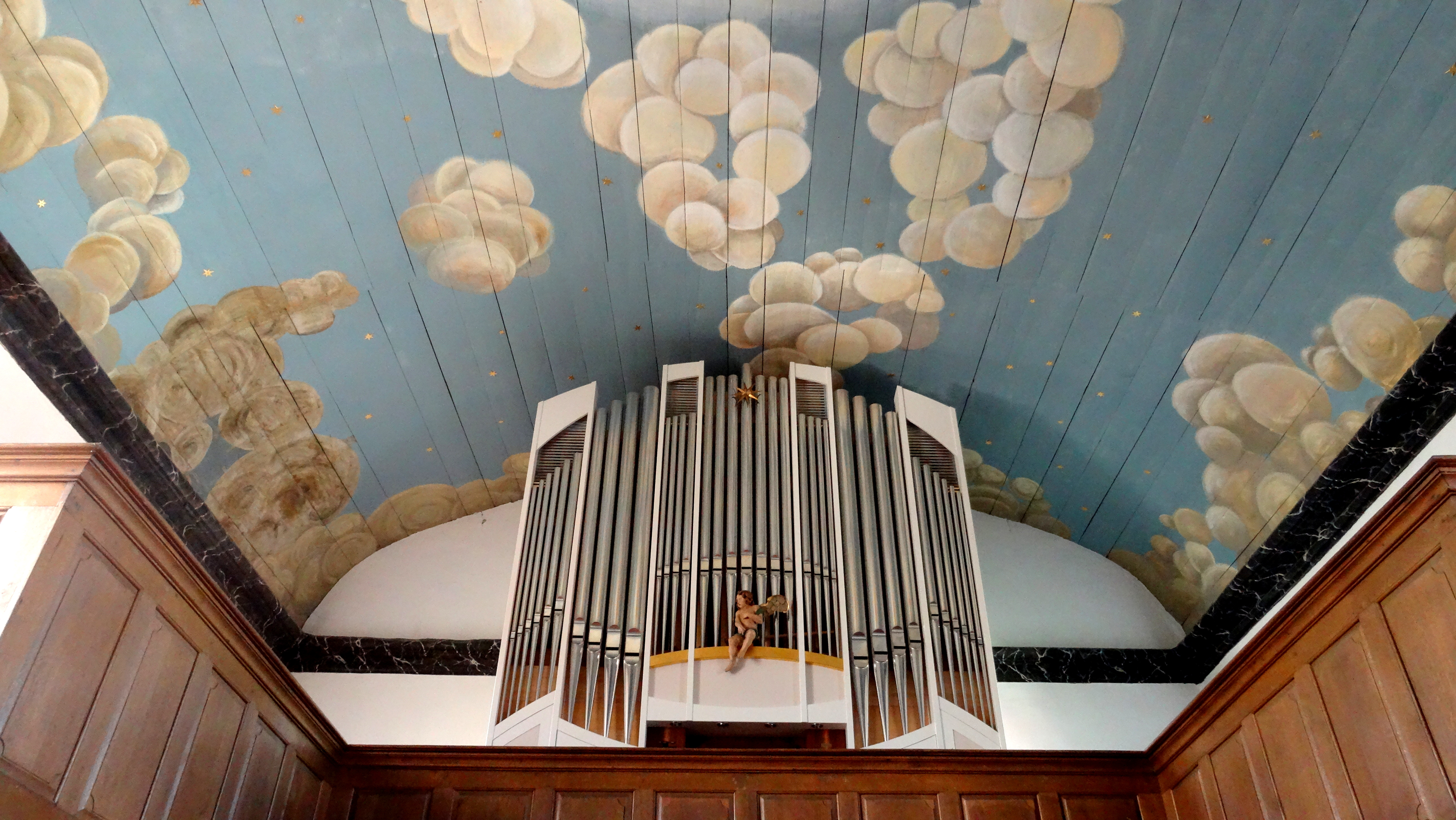 Altwildungen Nikolaikirche Orgel